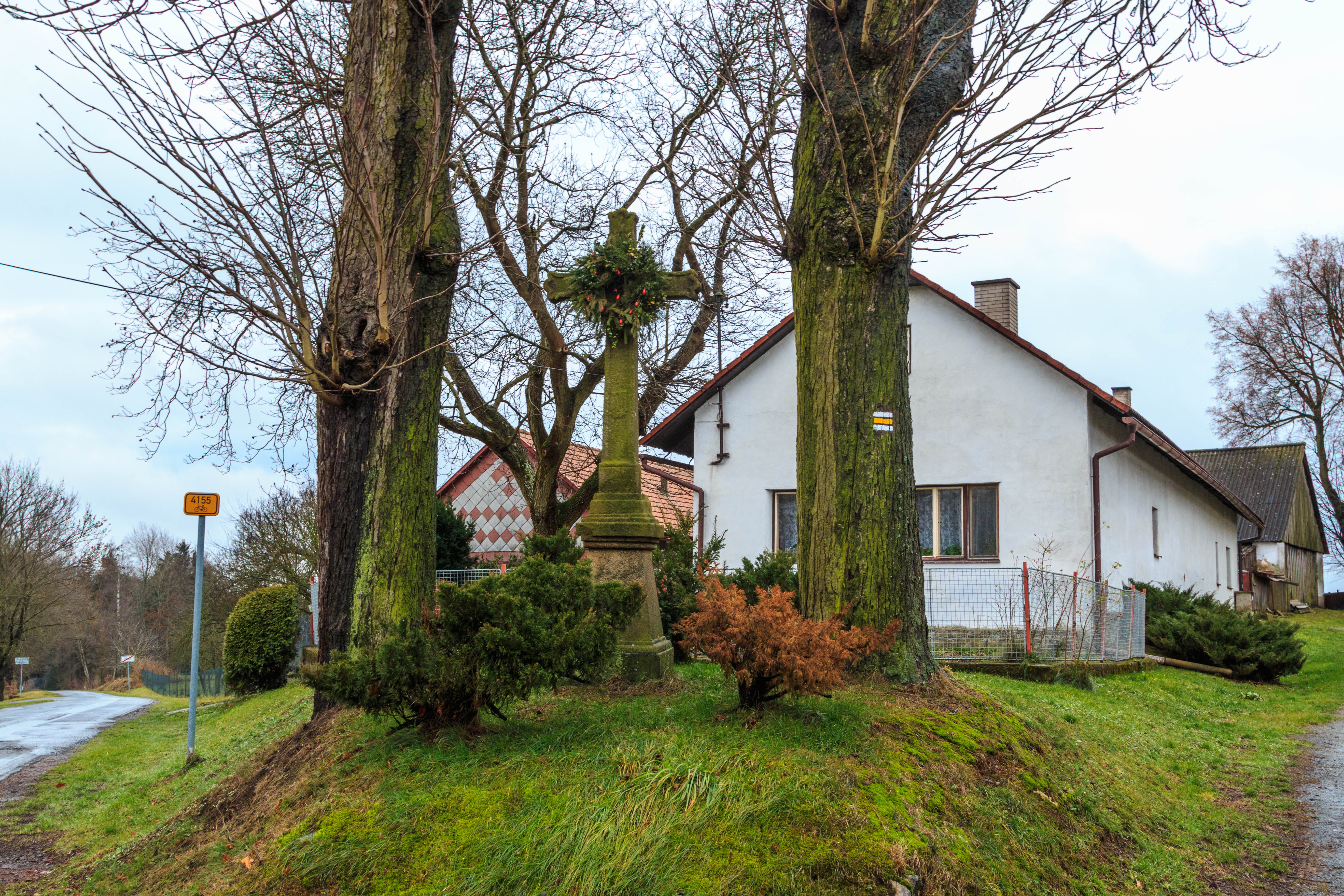 Zboží kříž